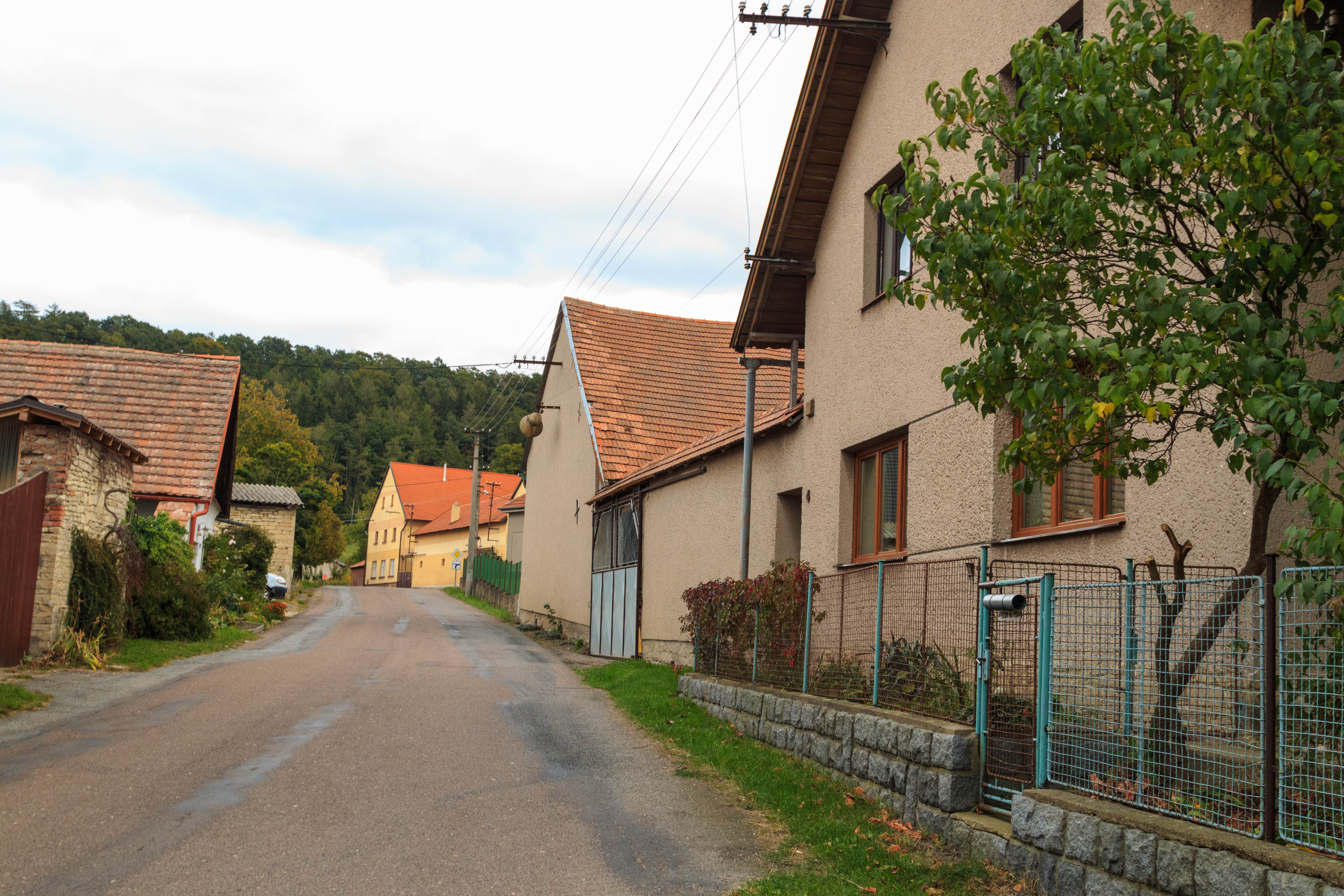 Domanice čp. 15